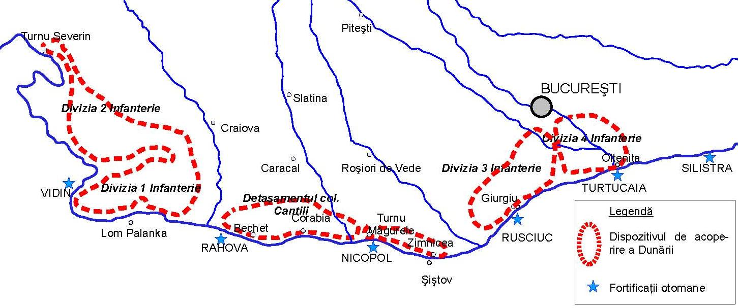 Acțiunea de acoperire strategică a Dunării de către armata română (1877)